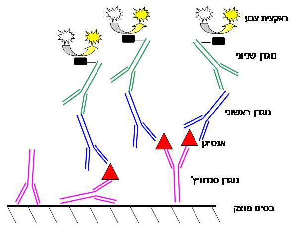 אלייזת סנדוויץ'- לבסיס מוצק נספחים נוגדנים, אליהם נקשרים לפי הסדר האנטיגנים, הנוגדן הראשוני, הנוגדן השניוני. לנוגדן השניוני מצומד אנזים שבמגע עם סובסטרט גורם לראקציית צבע.